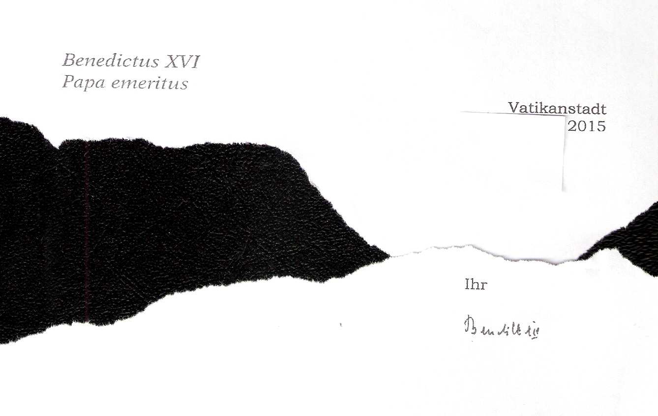 aktueller Briefkopf und Unterschrift von Papst Benedikt XVI. emeritus